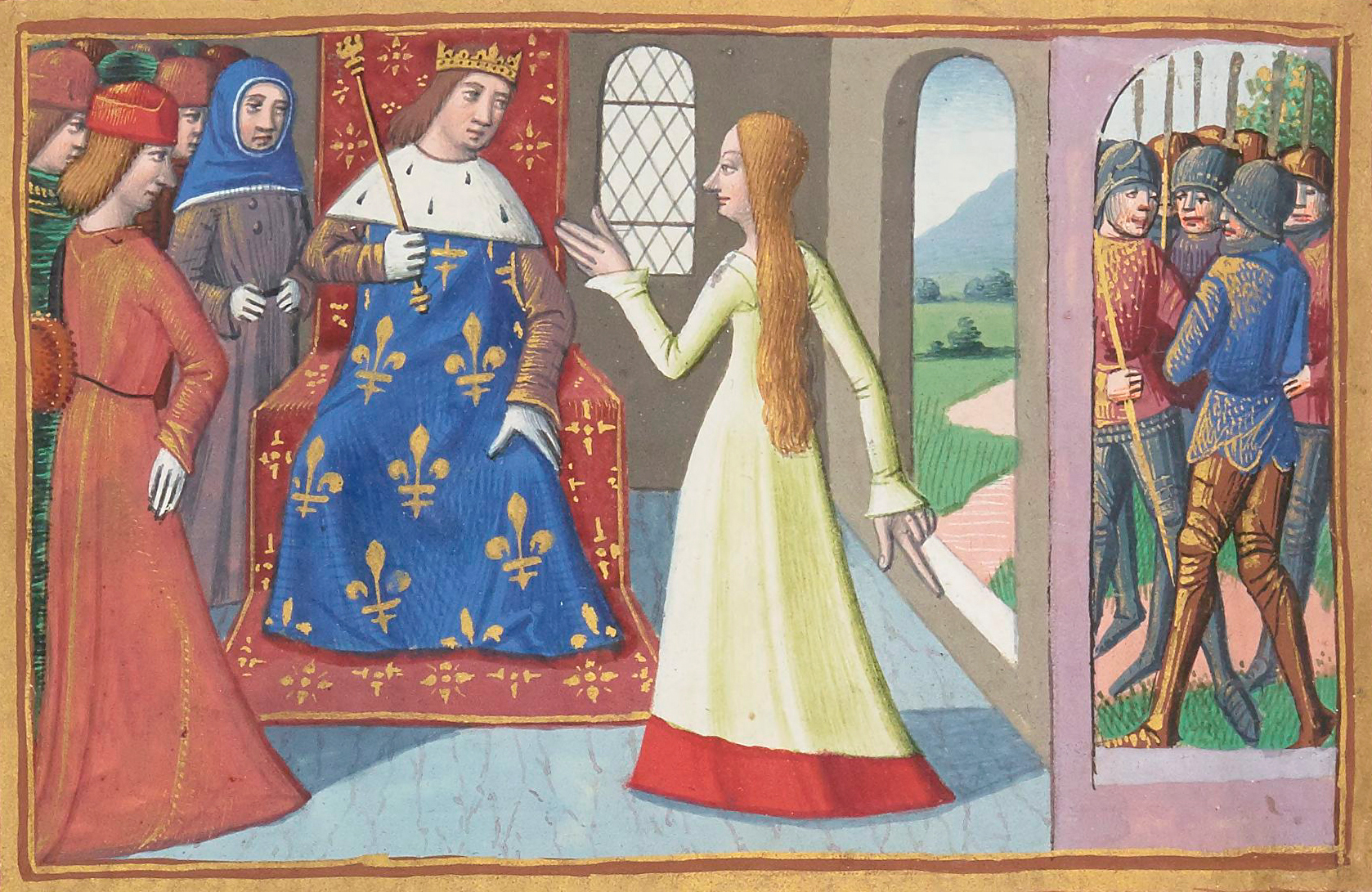 Jeanne d'Arc convainc Charles VII de poursuivre le siège de Troyes. Miniature du manuscrit de Martial d'Auvergne, Les Vigiles de Charles VII, vers 1484, BnF, Manuscrit Français 5054, folio 61 verso.